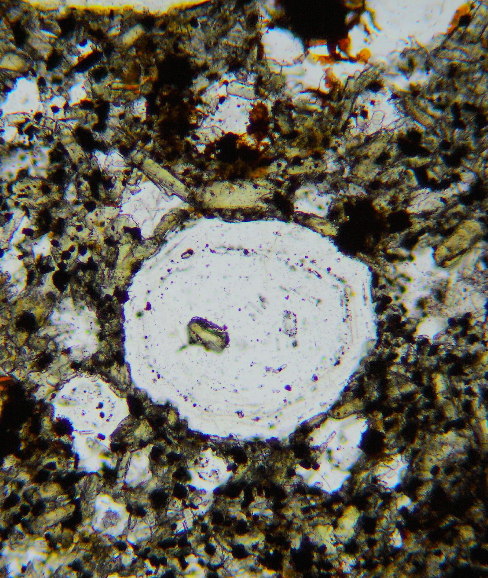 Leucit im Dünnschlff mit (LPL) "Schlackenkränzchen"